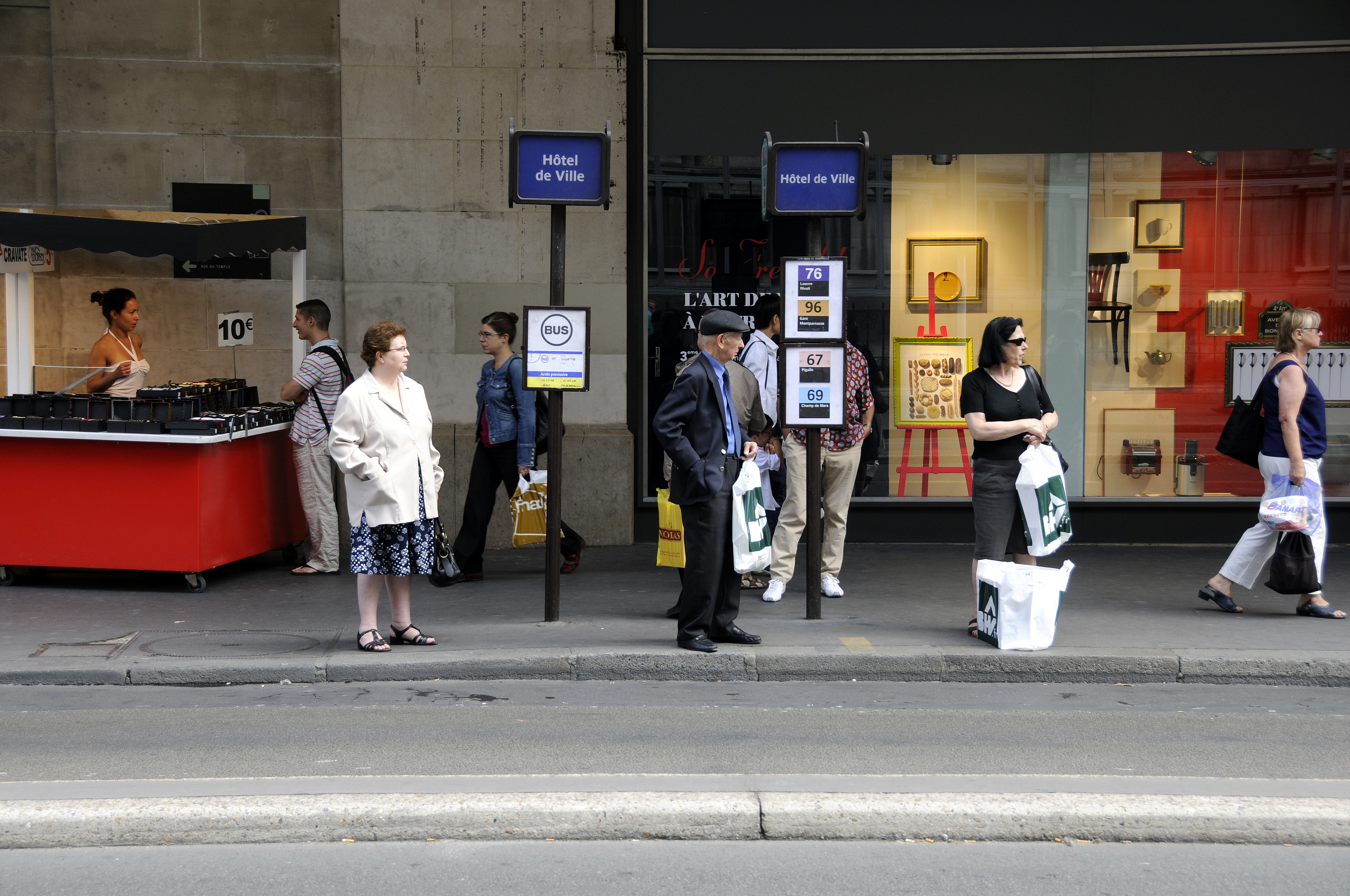 Hotel de Ville bus stop, Paris.